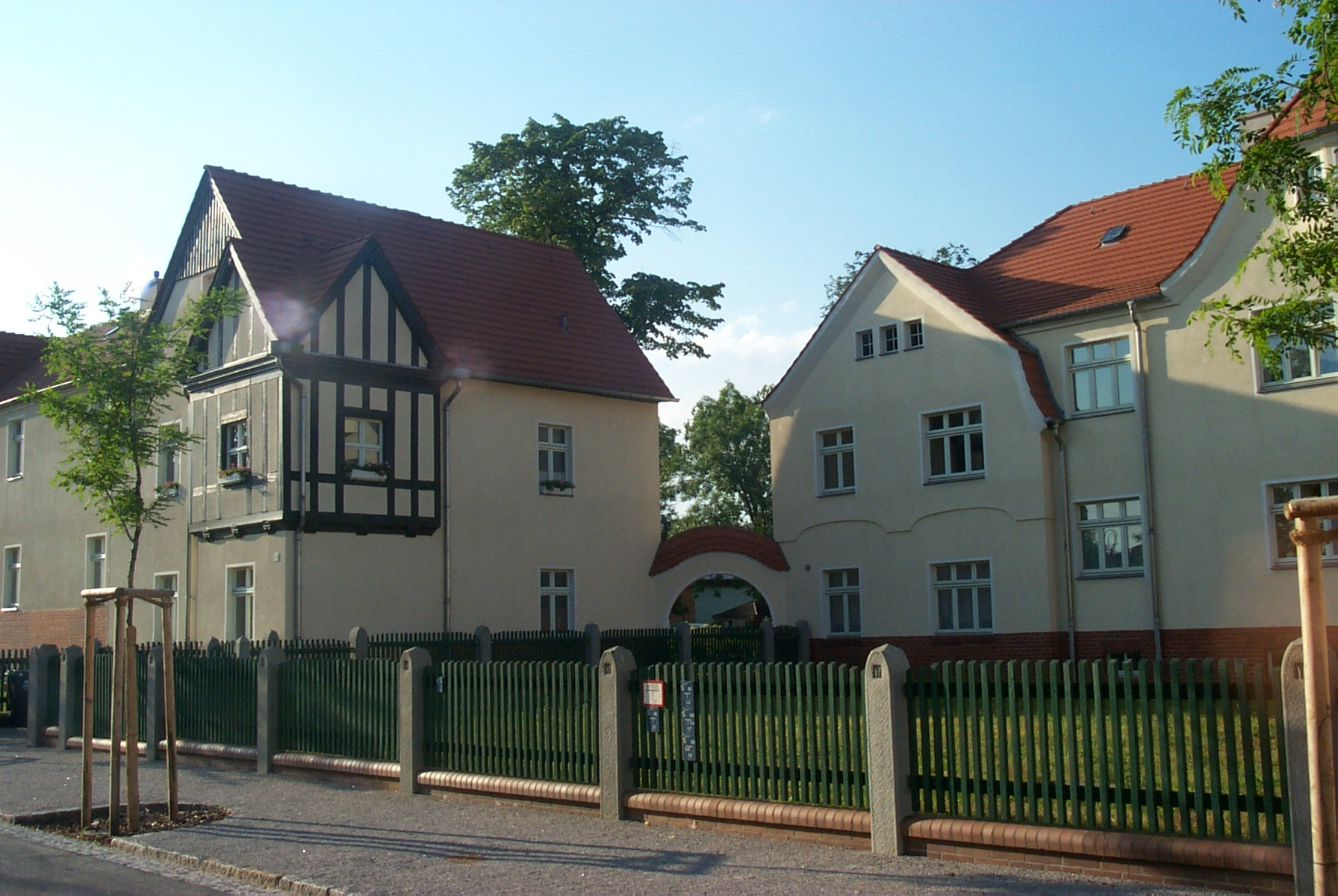 Graden City Marga, Brieske (Senftenberg) Germany